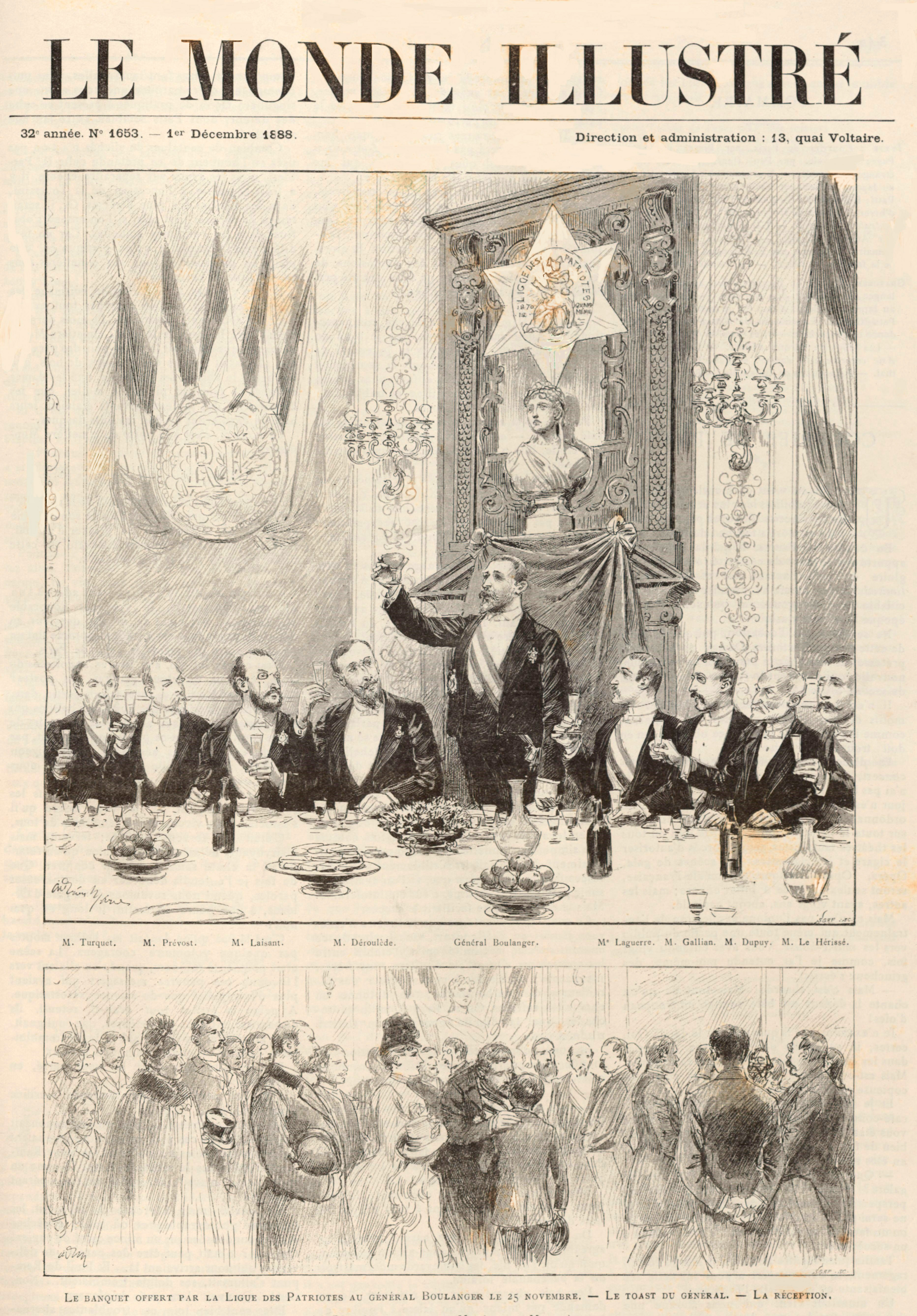 Le général Boulanger porte un toast au banquet offert par la Ligue des patriotes dans les salons du restaurant Lemardeley, rue Richelieu. Les convives tiennent ensuite une réception ouverte. Illustrations d'Adrien Marie à la une du Monde illustré, décembre 1888.